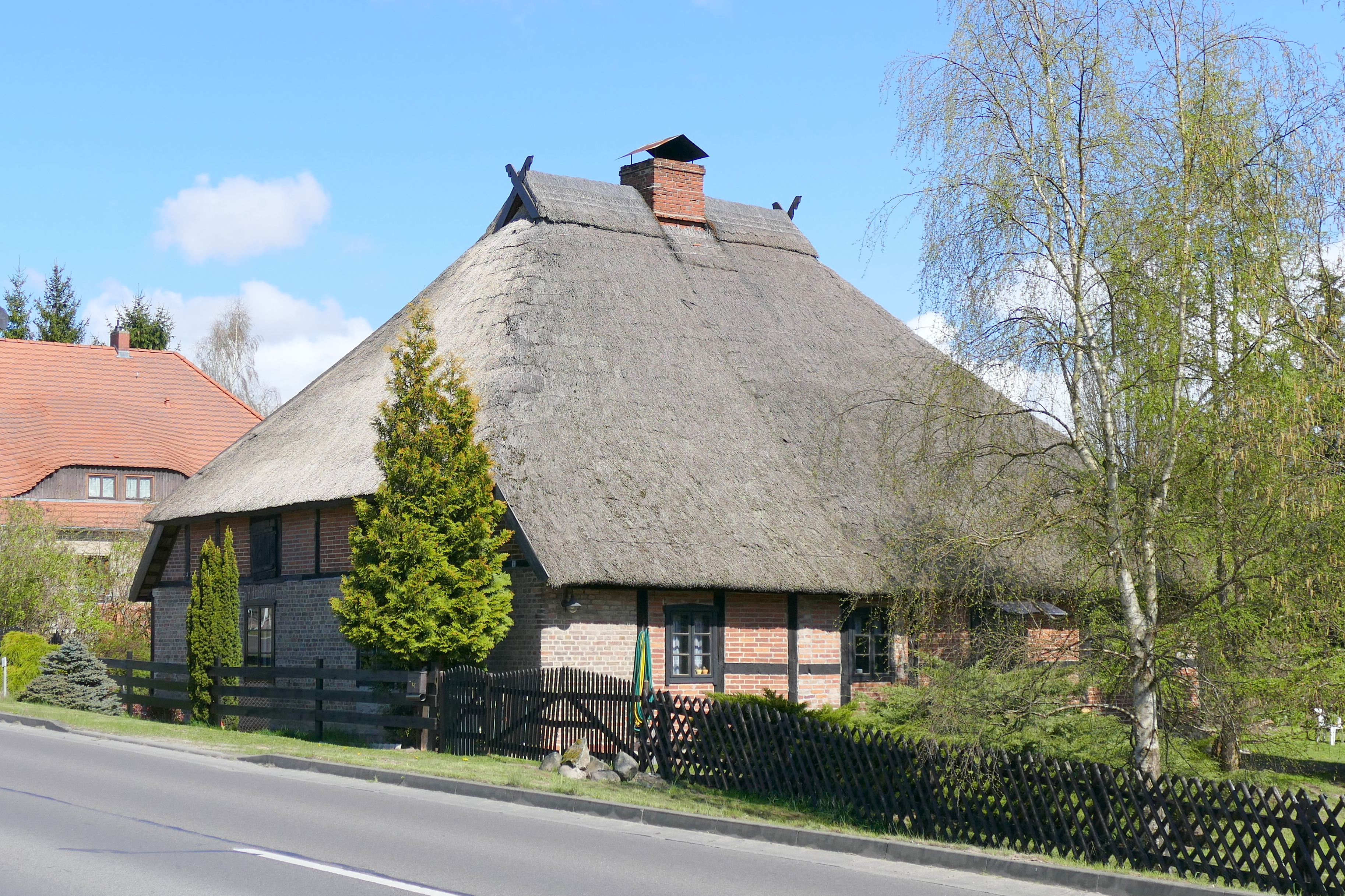 Vierpottkaten in Murchin an der Bundesstraße 110